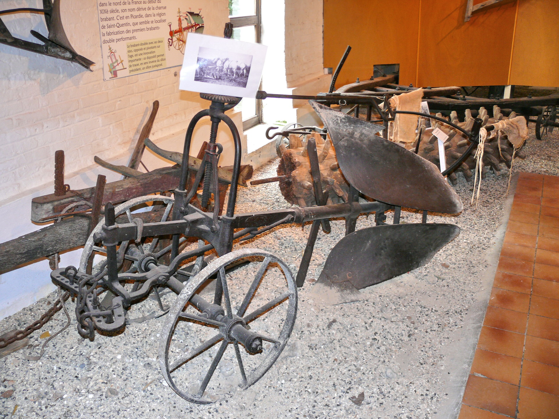 Ecomusée d'Hétomesnil : Charrue à brabant double. Cette charrue aurait été inventée au début du XIXe siècle dans le nord de la France.